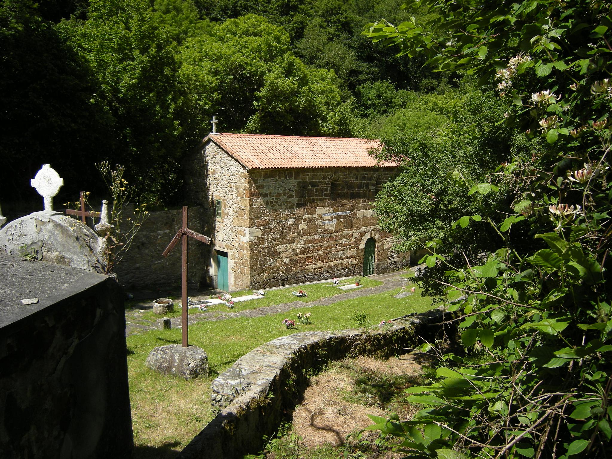 gl: Igrexa prerrománica de Santo Antolín de Toques